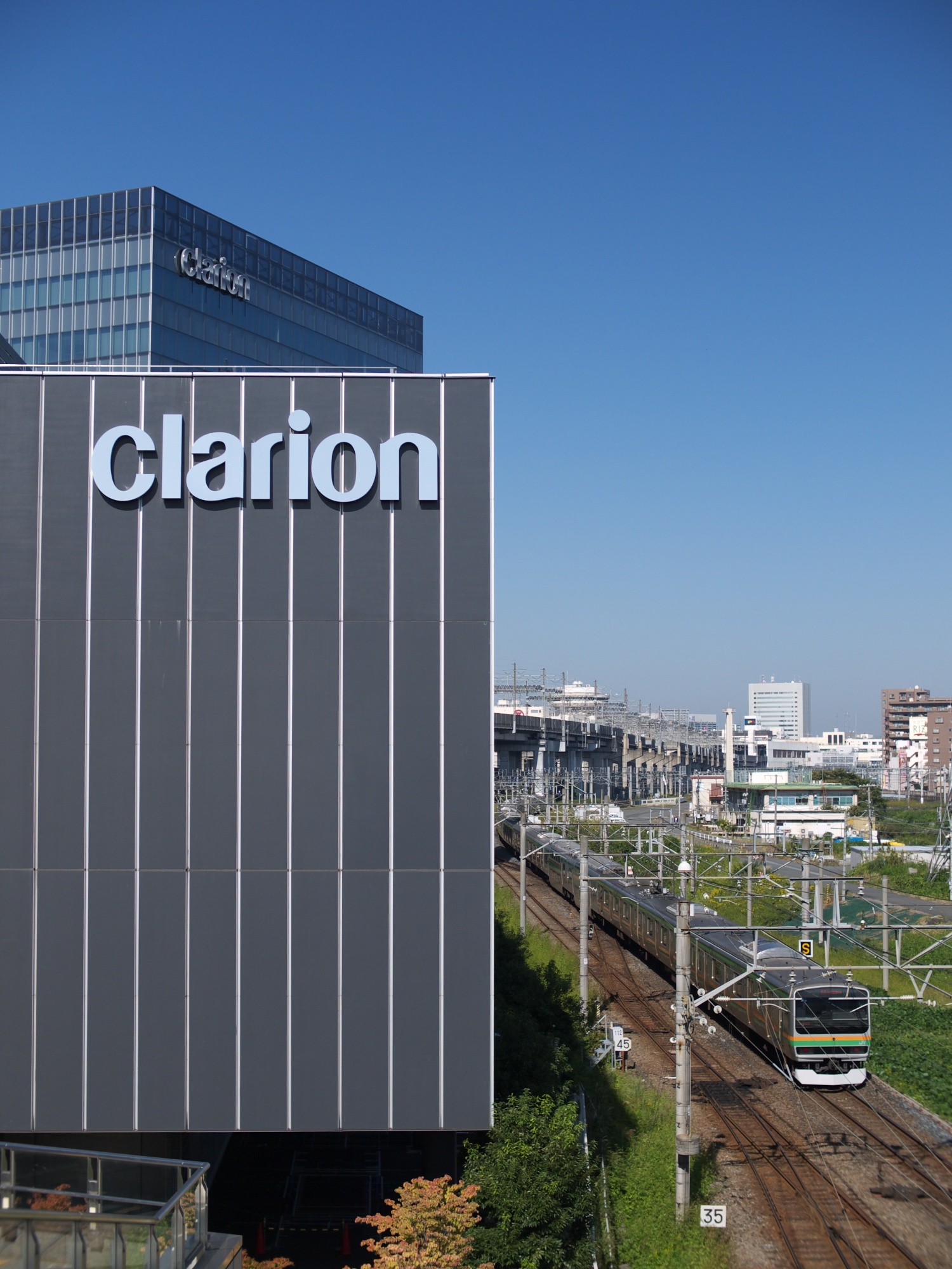 さいたま新都心にあるクラリオンの本社社屋。